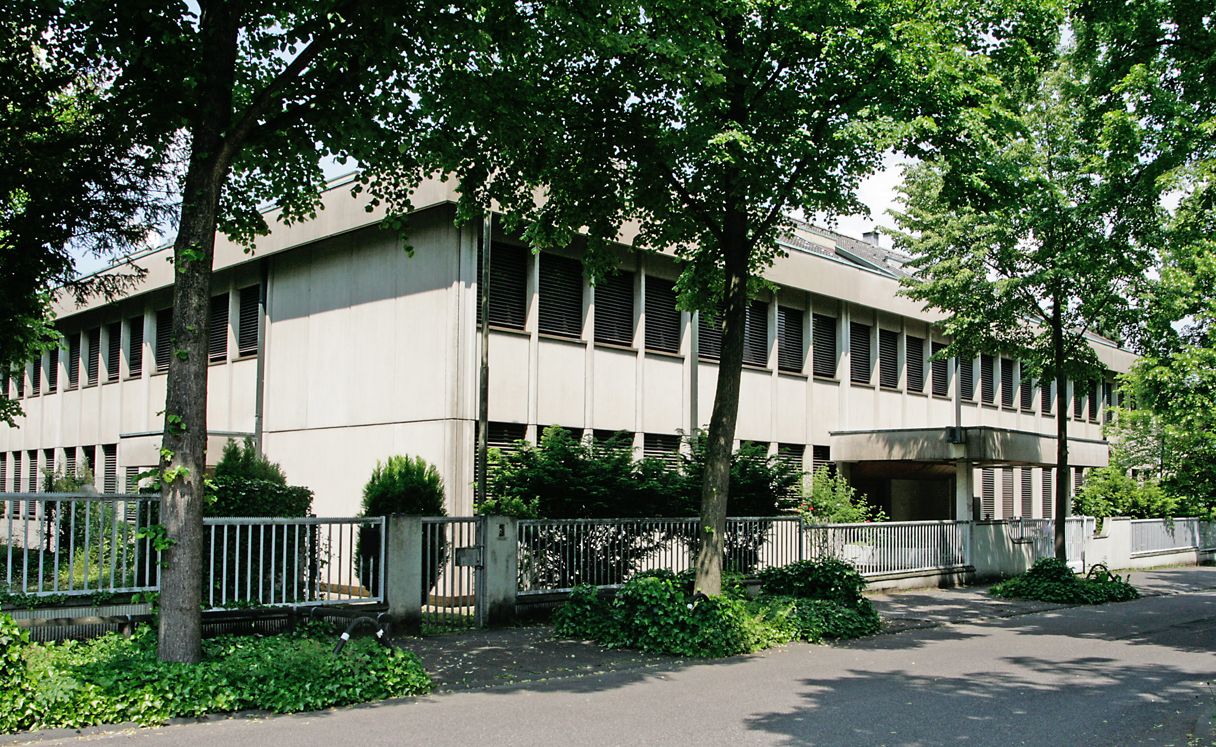 Gebäude der ehemaligen Botschaft der Republik Jugoslawien, Schlossallee 5, Mehlem, Bad Godesberg, Bonn